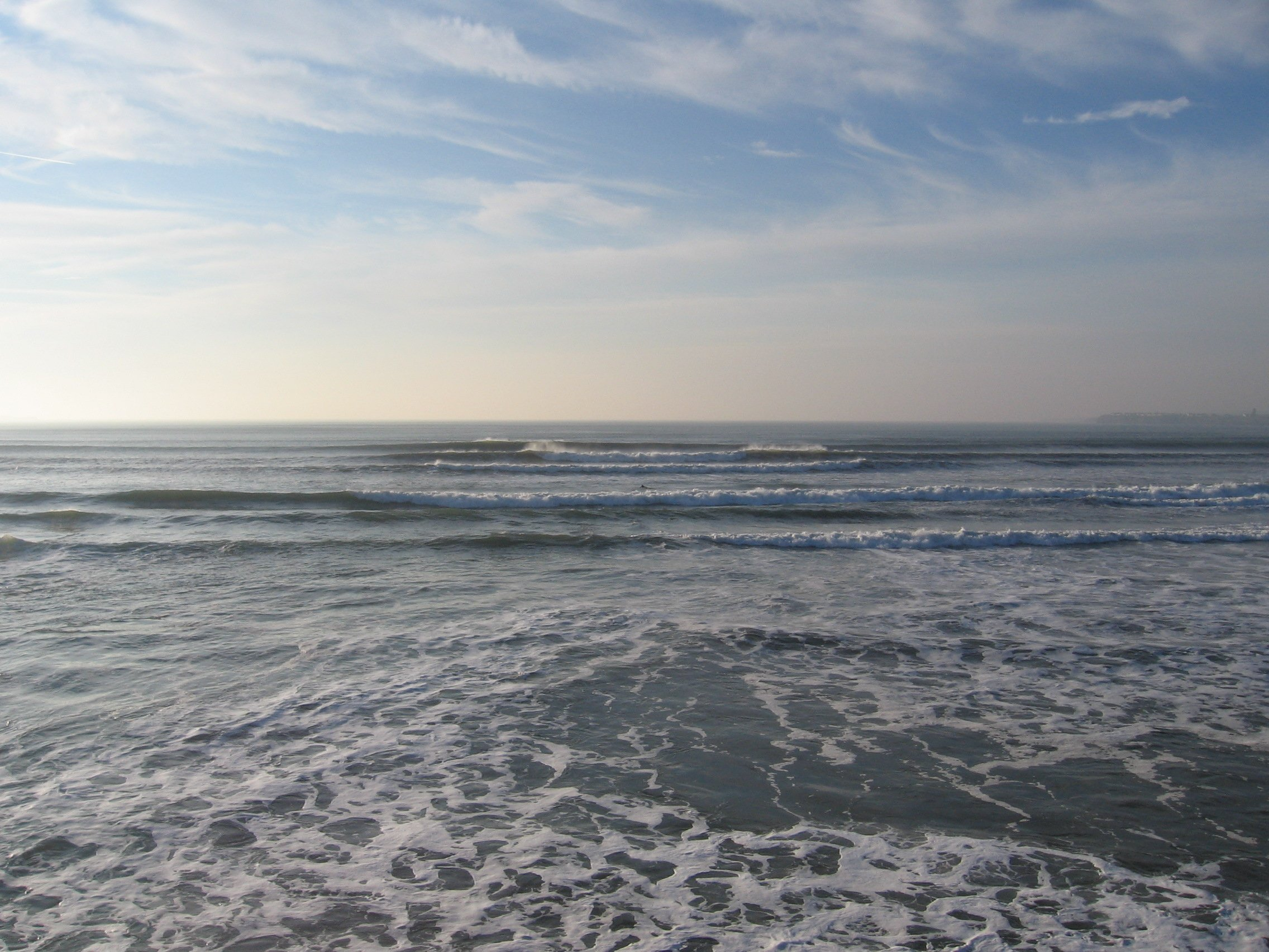 Lahinch (Meer)